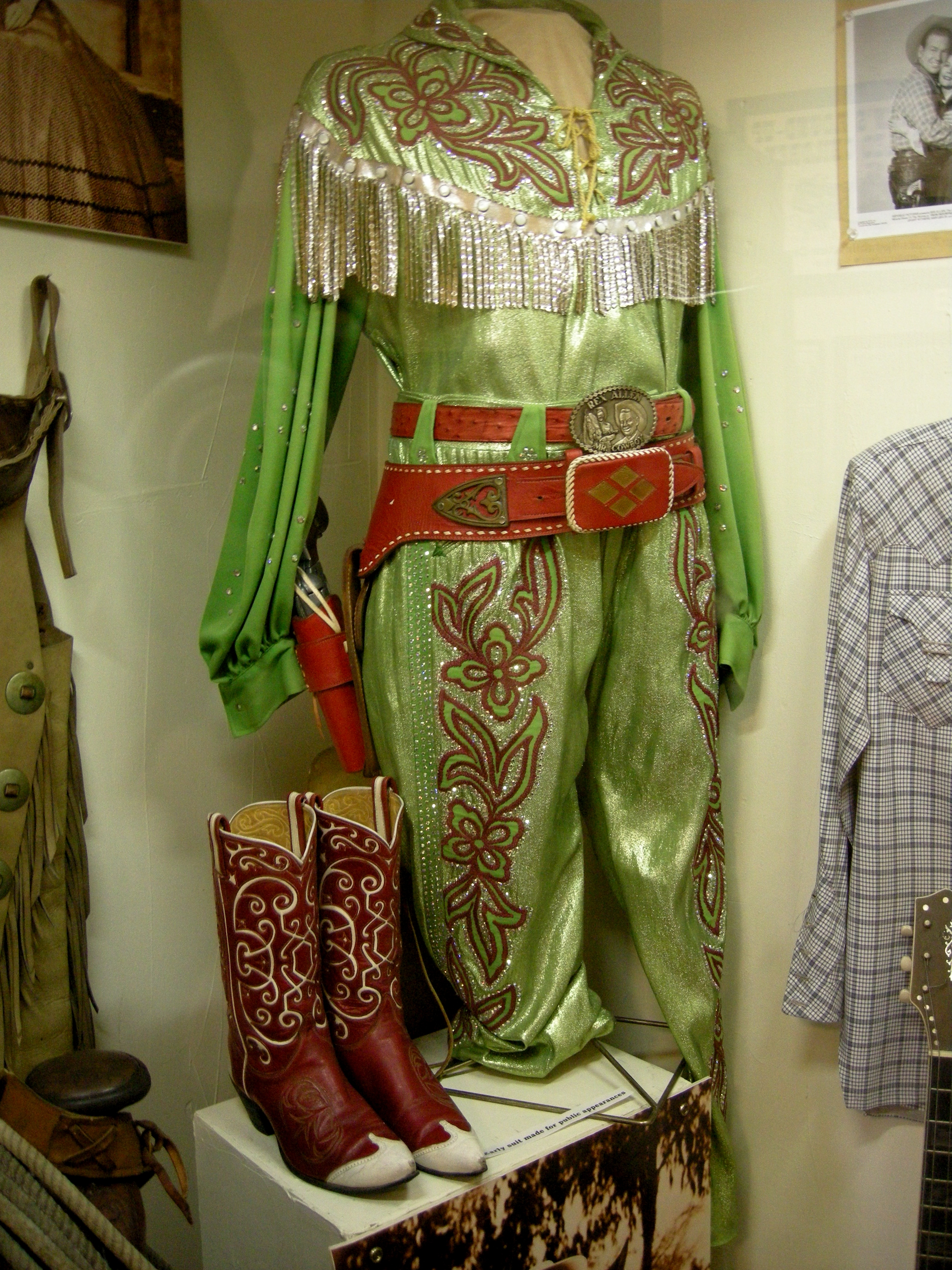 Rex Allen Museum, Willcox, AZ